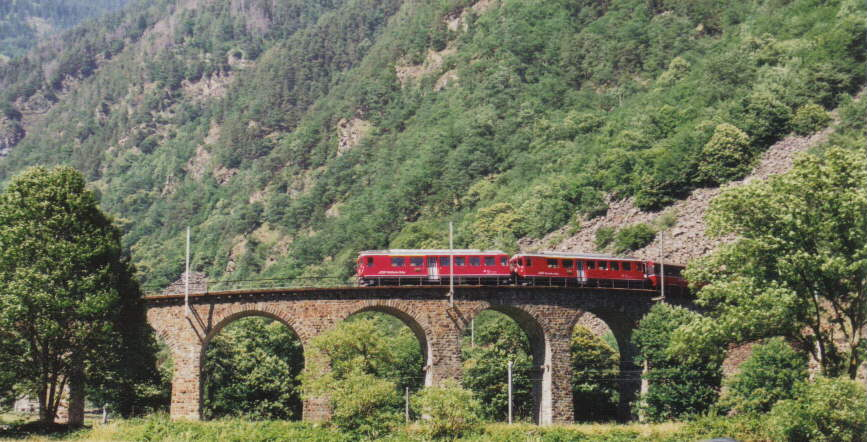 Der Kreisviadukt der Berninabahn in Brusio, de:22. Juni de:2003. Steffen Mokosch